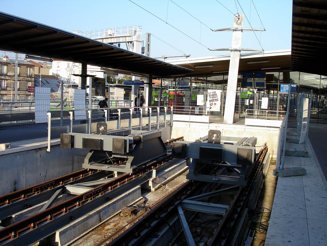 Gare d'Ermont - Eaubonne (Val-d'Oise)